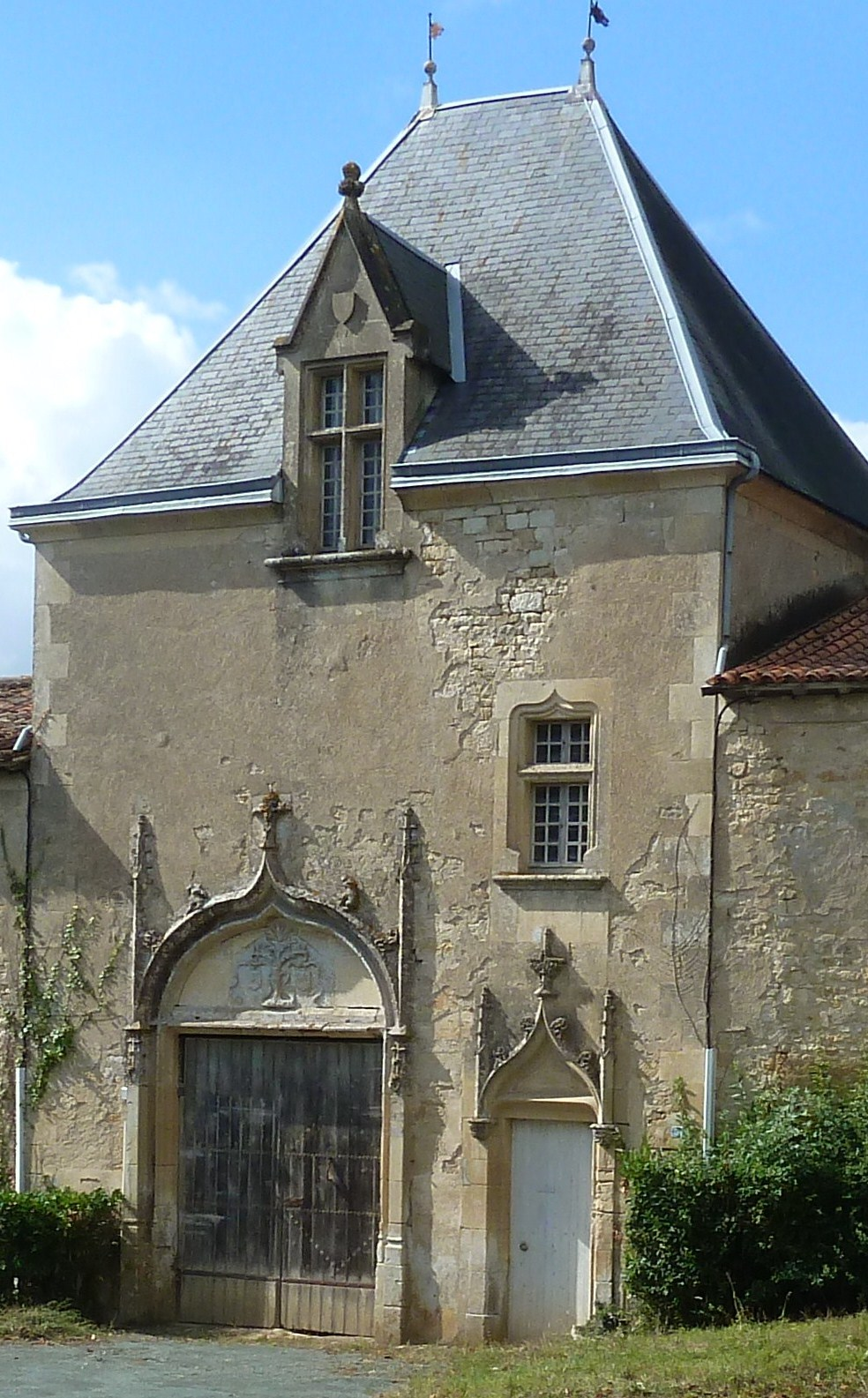 Château du bourg - Porche d'entrée